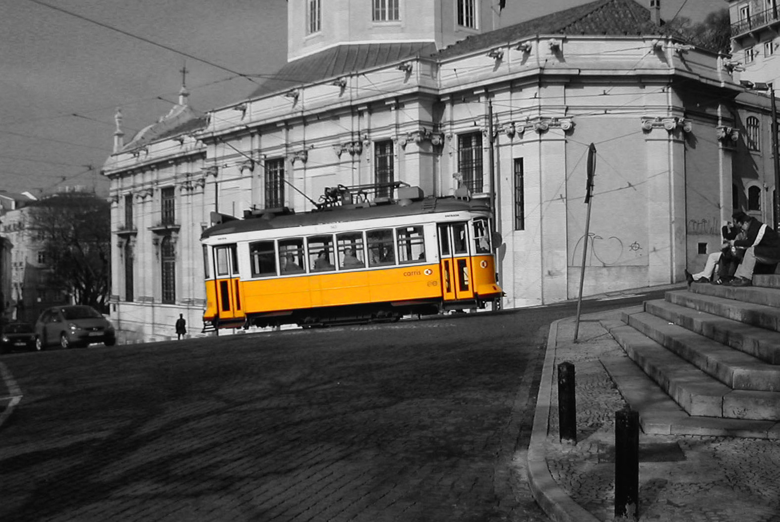 Lisboa